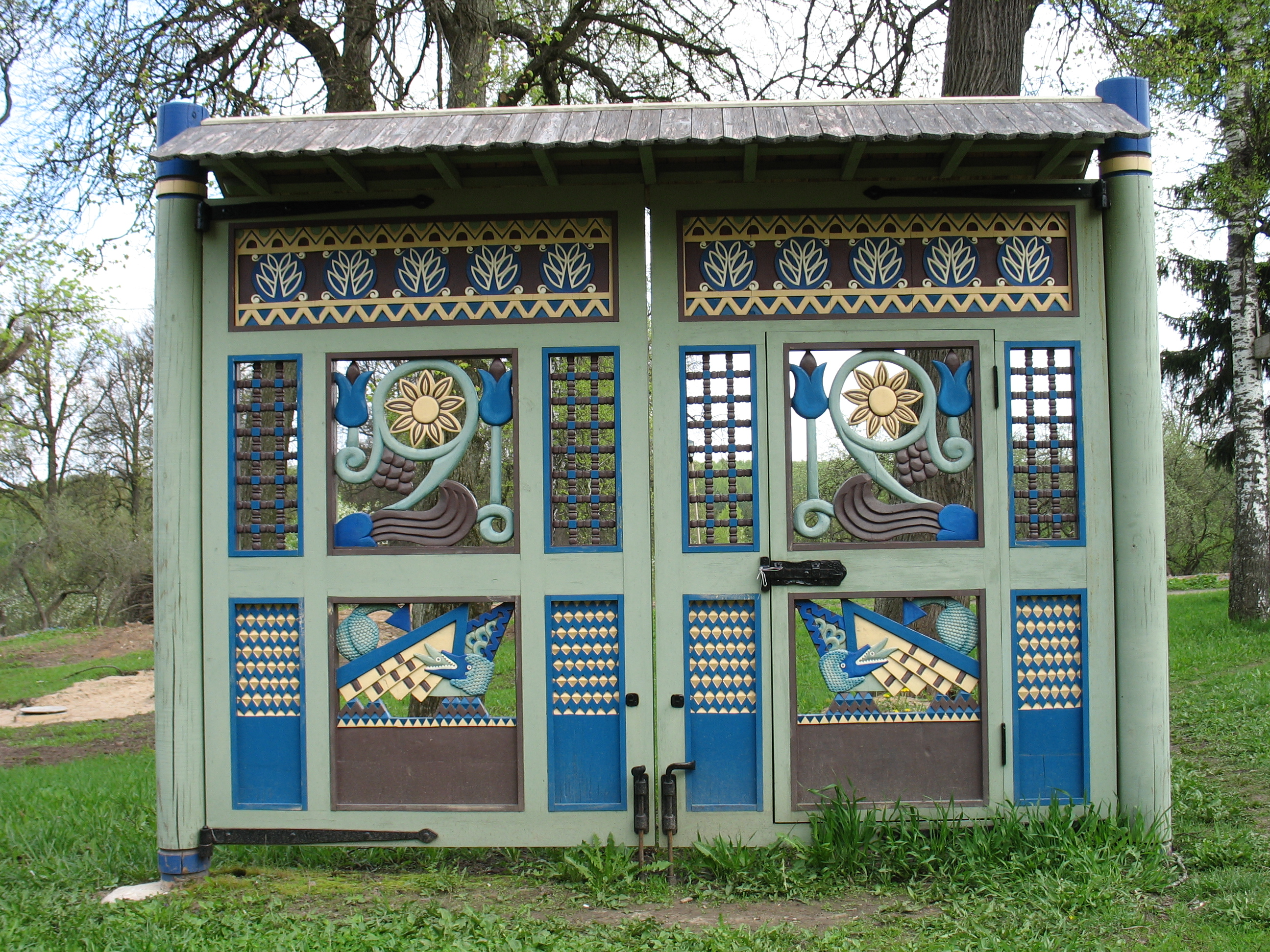 Ворота на территории бывшей усадьбы Тенишевых - Талашкино